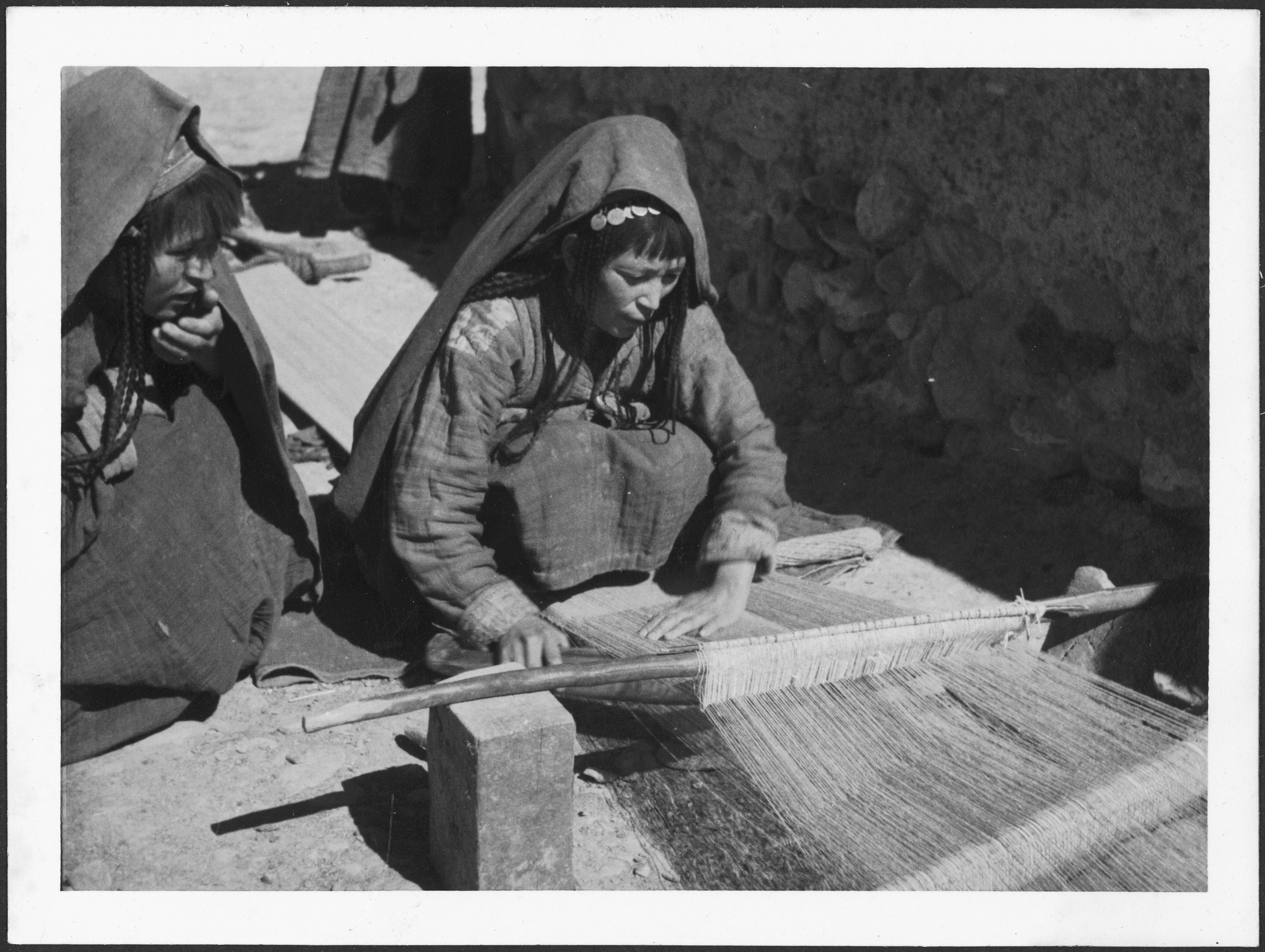 Afghanistan, Shibar Pass (Shebar Pass, Kowtal-e Shebar): Menschen; Frauen beim Weben an einem Flachwebstuhl